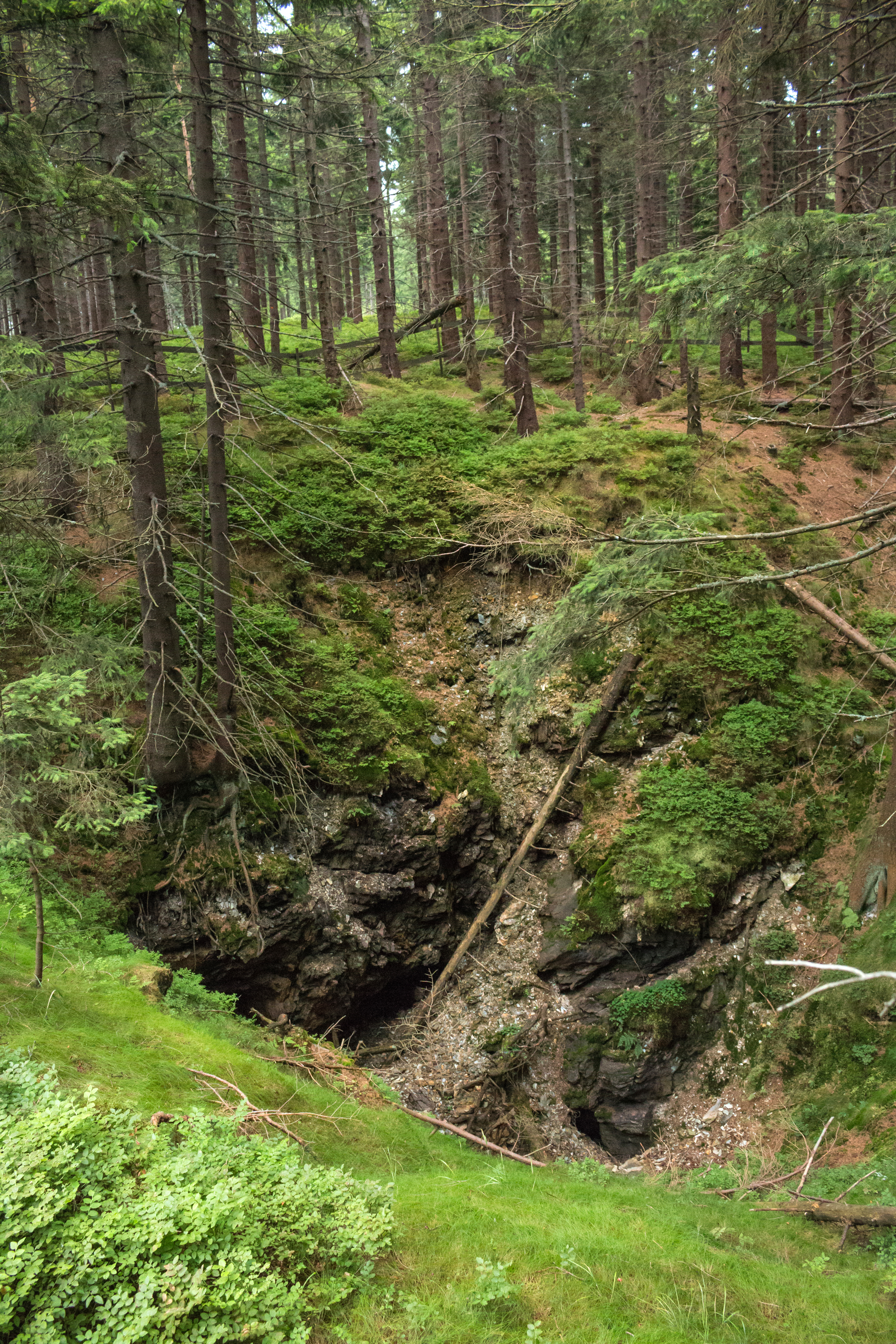 Jeden z propadů v místě Olověné štoly, Horní Údolí.